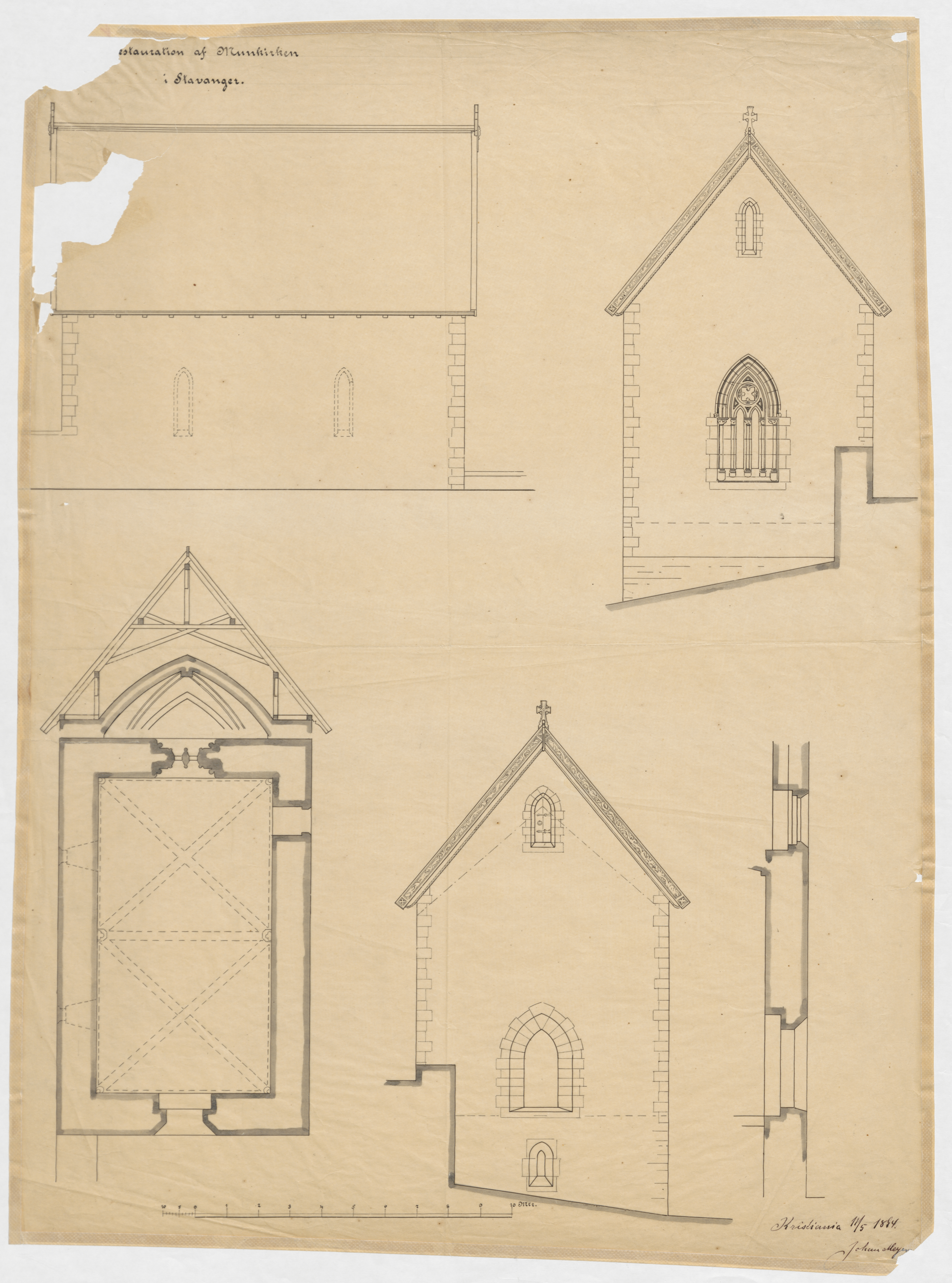 Bildet er hentet fra Riksantikvaren. Restaureringsforslag Eier : Riksantikvaren Sted : Norway, Rogaland, Stavanger Emneord: KAPELLER Medium